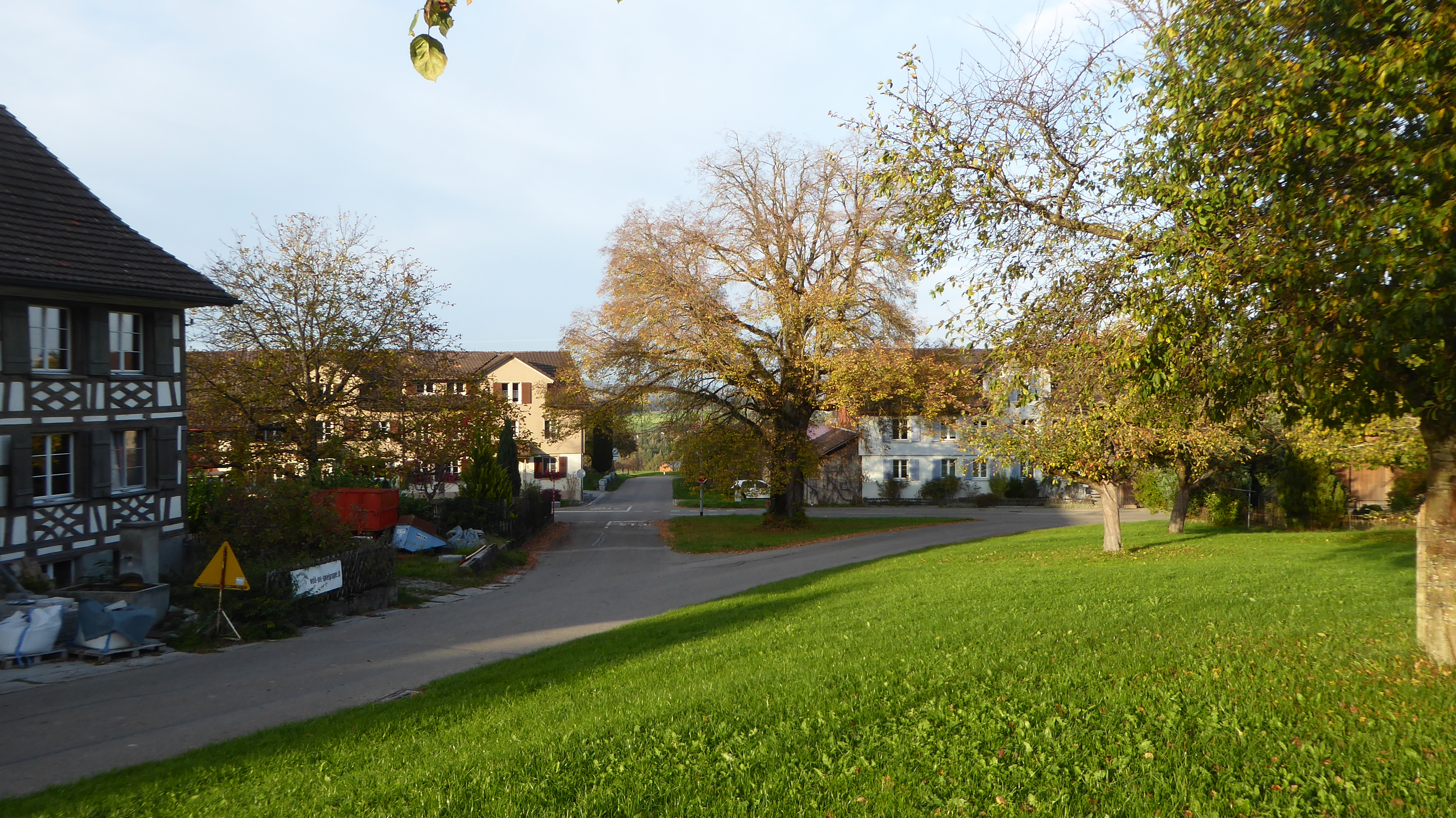 Pfannenstiel bei Holzmannhaus TG